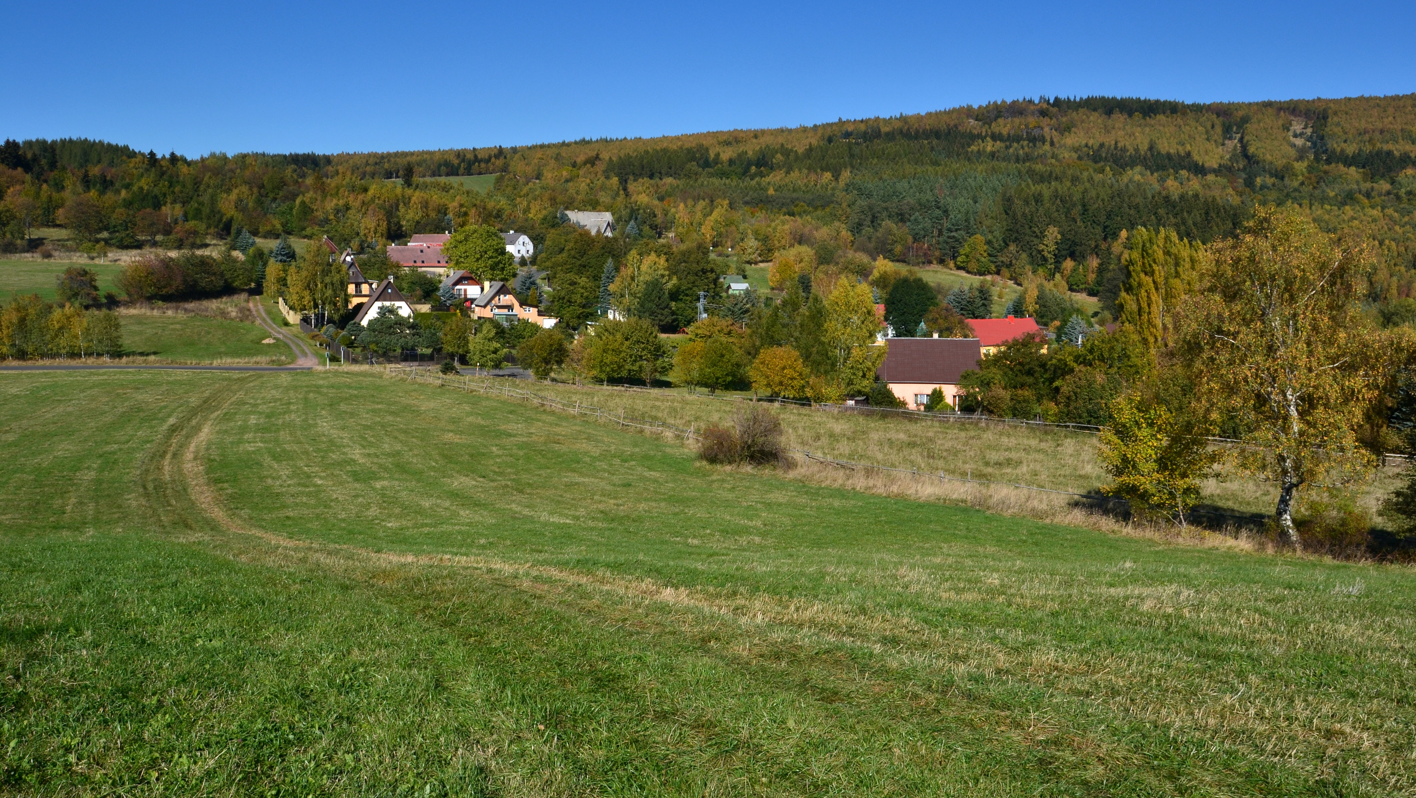 Vysoká Jedle - celkový pohled od jihu